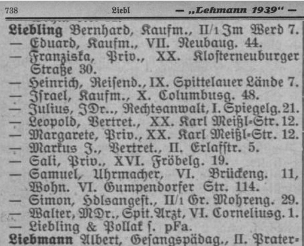 Lehmann's Allgemeiner Wohnungs-Anzeiger, Wien, 1939